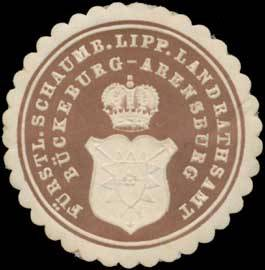 Sealing stamp Title: Fürstl. Schaumb. Lipp. Landrathsamt Bückeburg-Arensburg Description: braun, weiß, geprägt Place: Bückeburg size: 4 cm